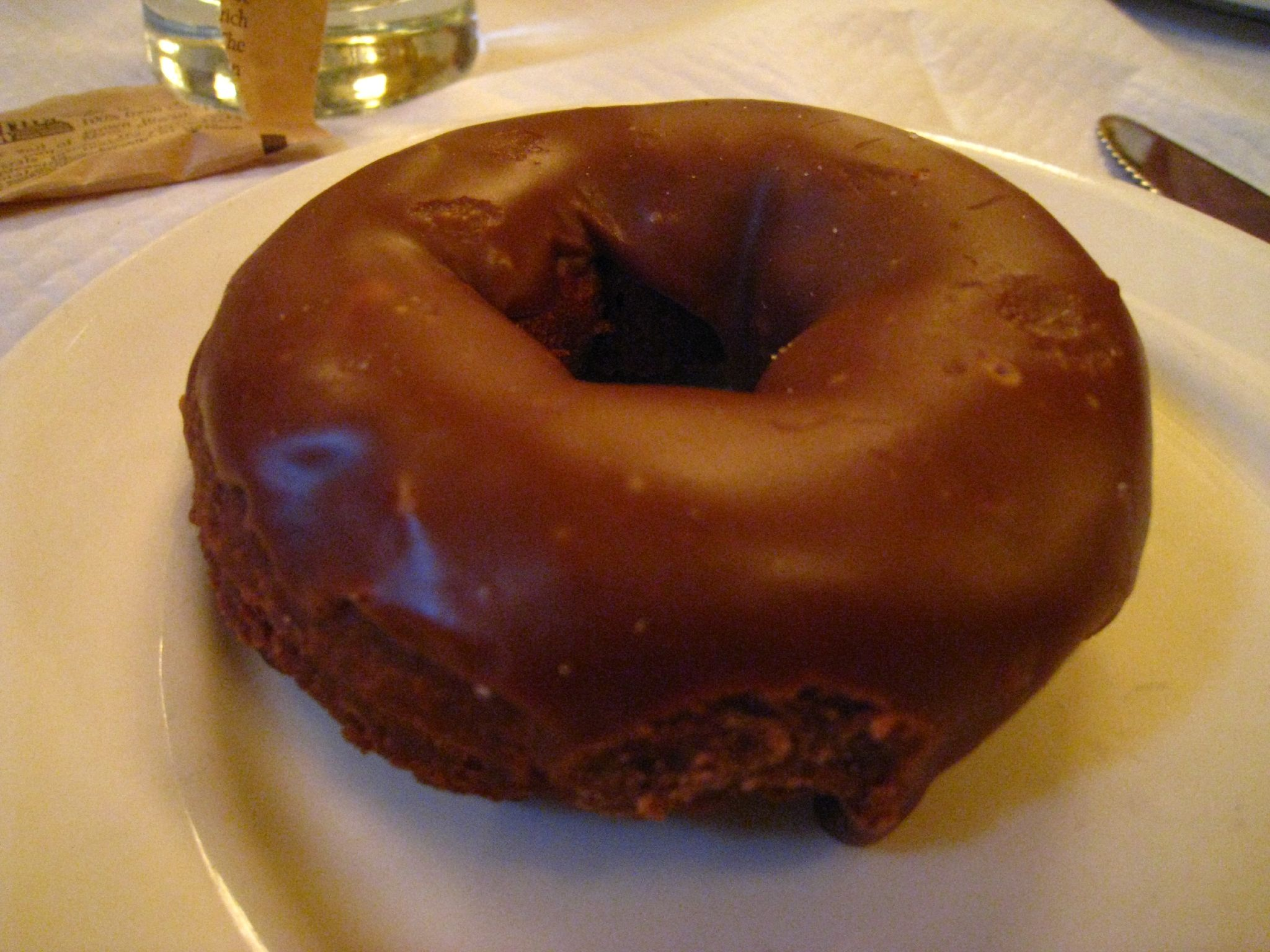 Chocolate donut